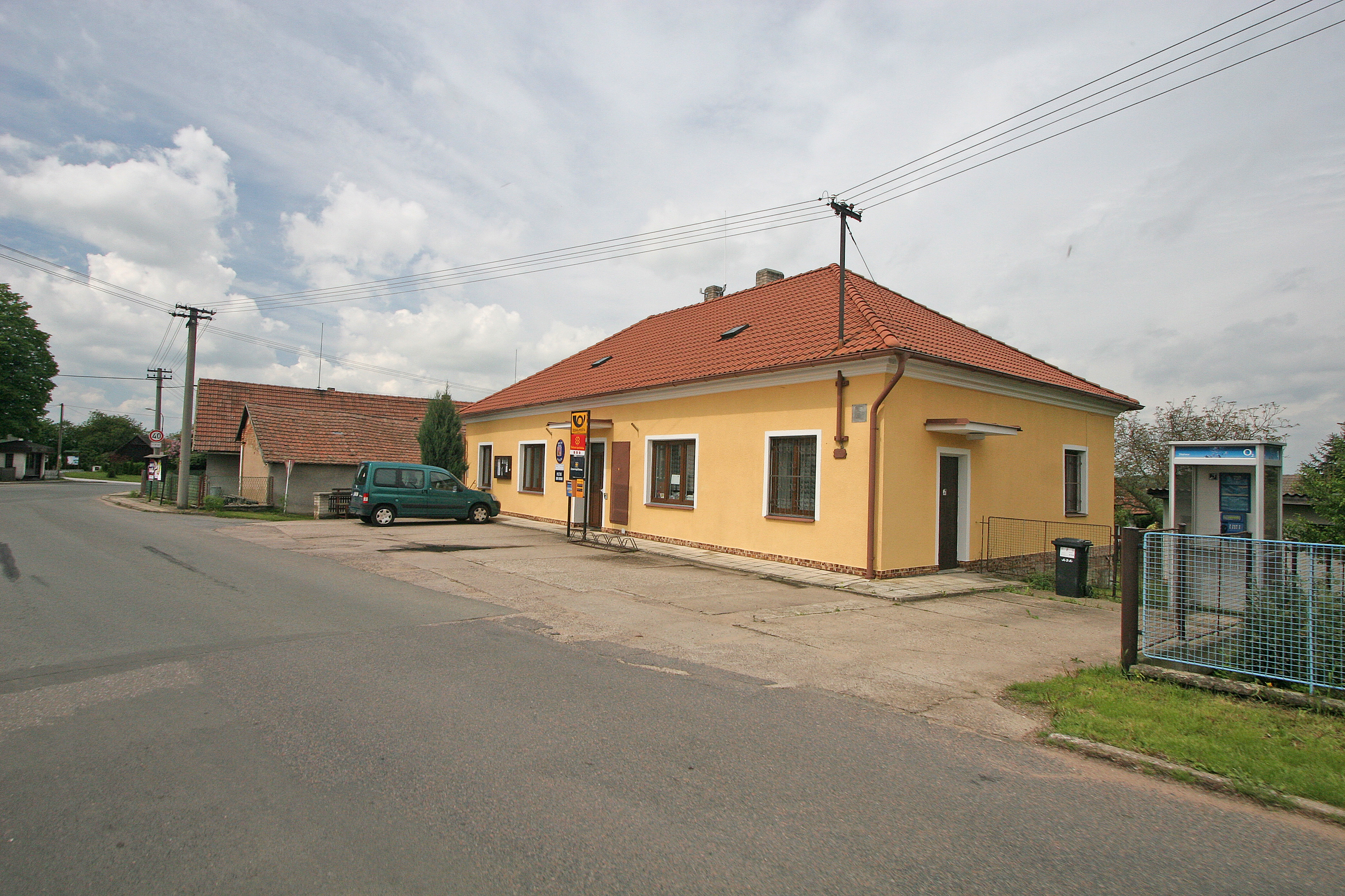 Měník obecní úřad